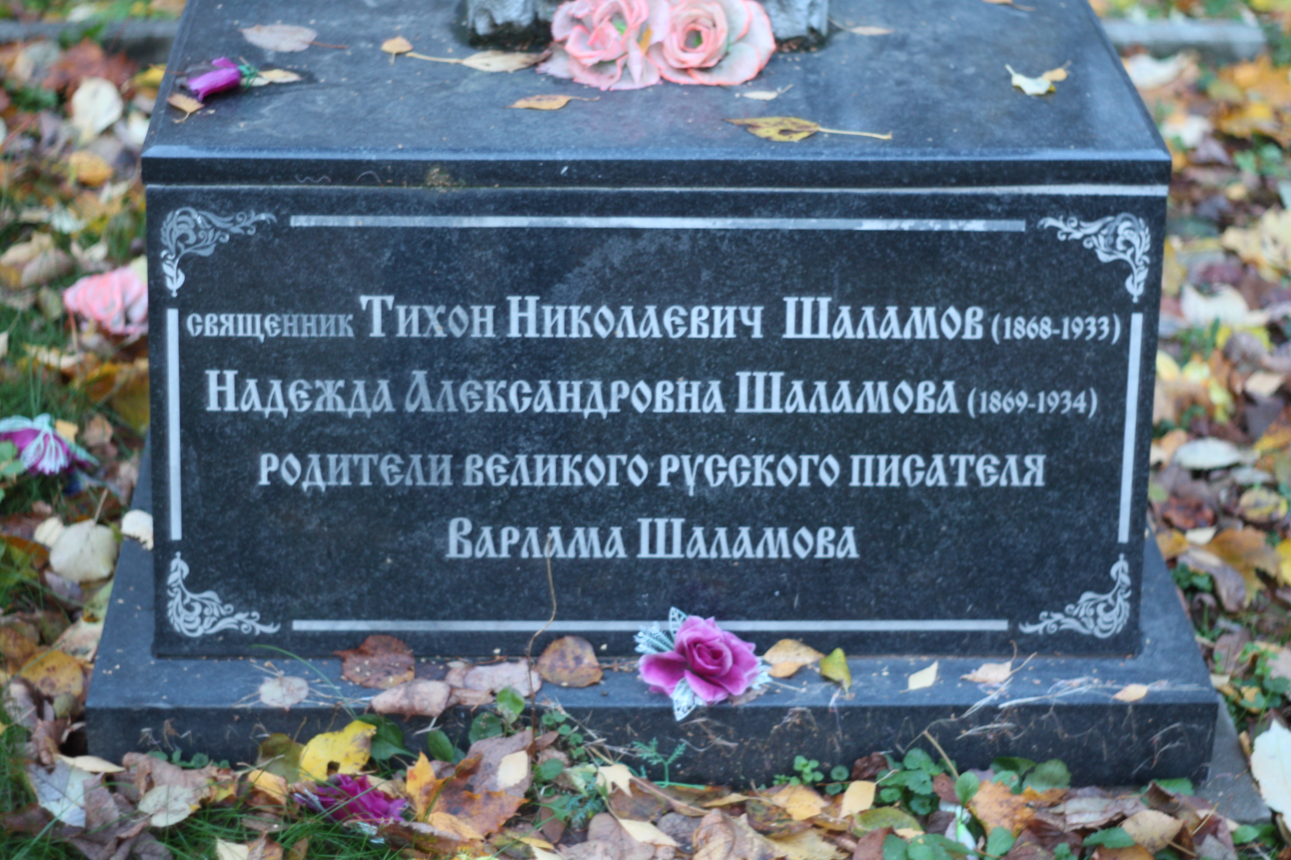 Введенское кладбище, г.Вологда.